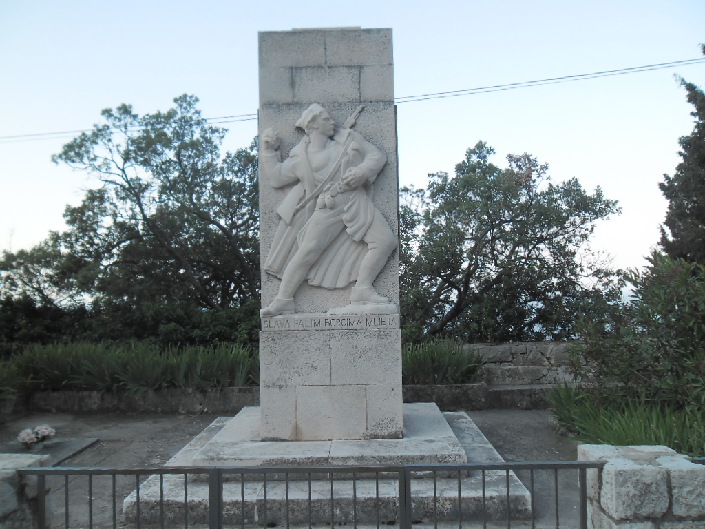 spomenik palim borcima NOR-a u Babinom Polju, otok Mljet